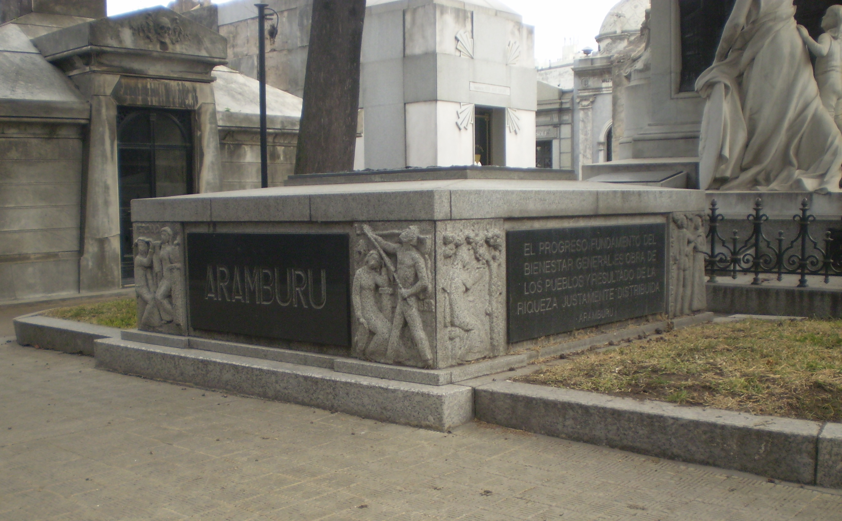 Monumento fúnebre de Pedro Eugenio Aramburu, Cementerio de la Recoleta, Buenos Aires.